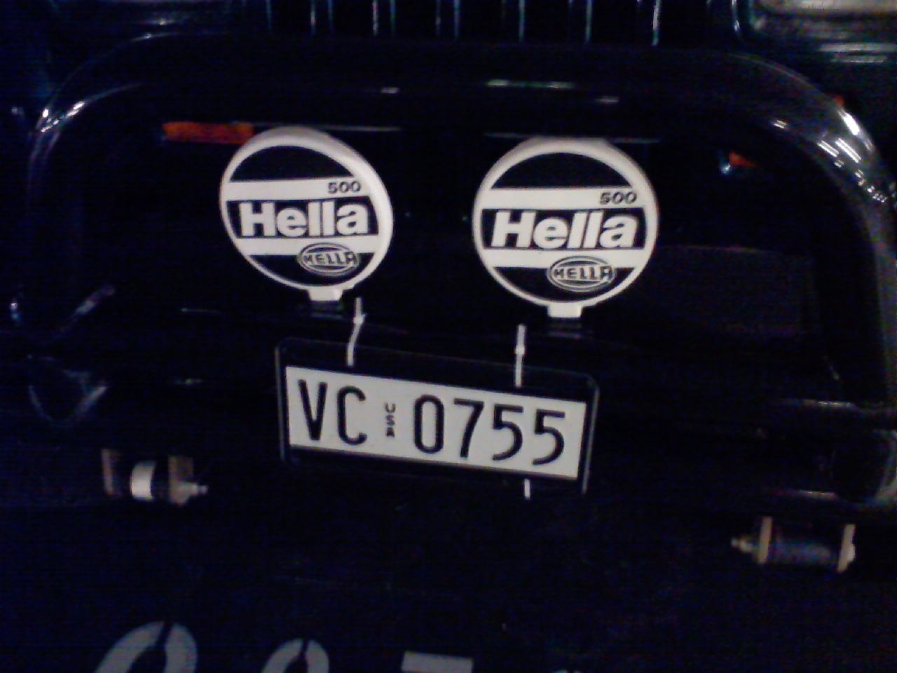 KFZ-Kennzeichen des Streitkräfte der US-Armee in Deutschland. Dieses Kennzeichen würde früher verwendet und findet heute keine Anwendung mehr.